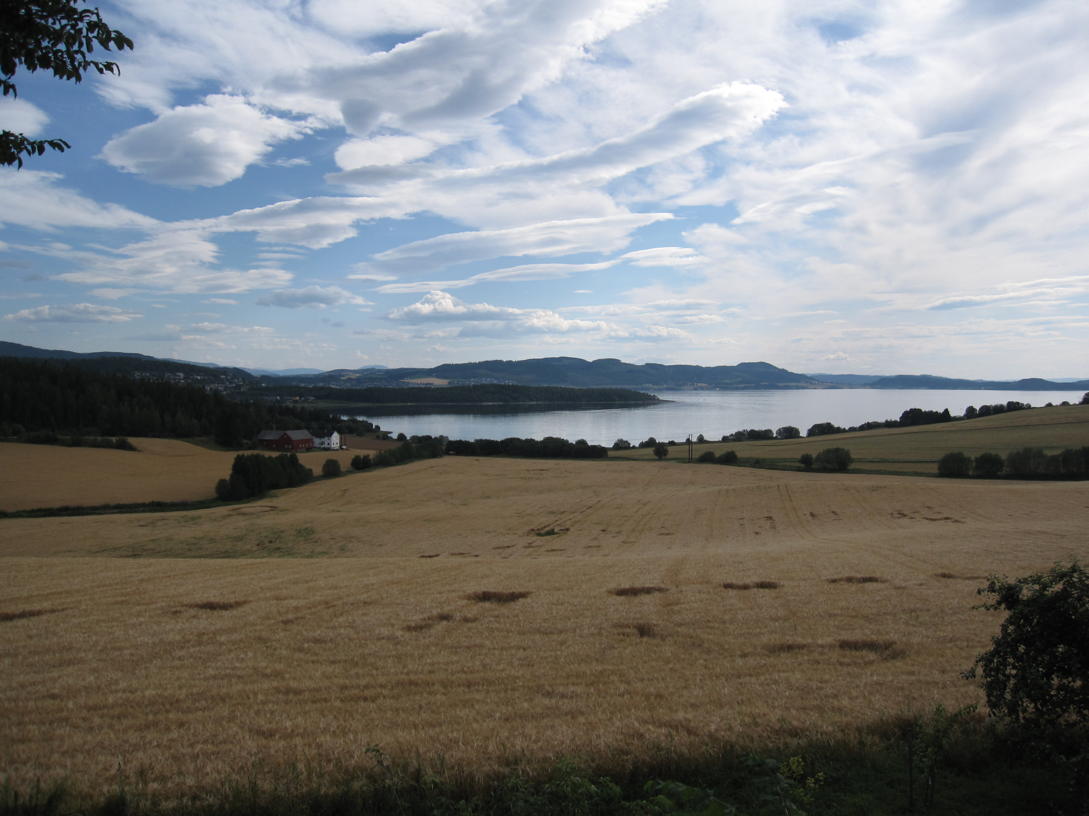 Utsikten fra Overrein gård mot Beitstadfjorden.